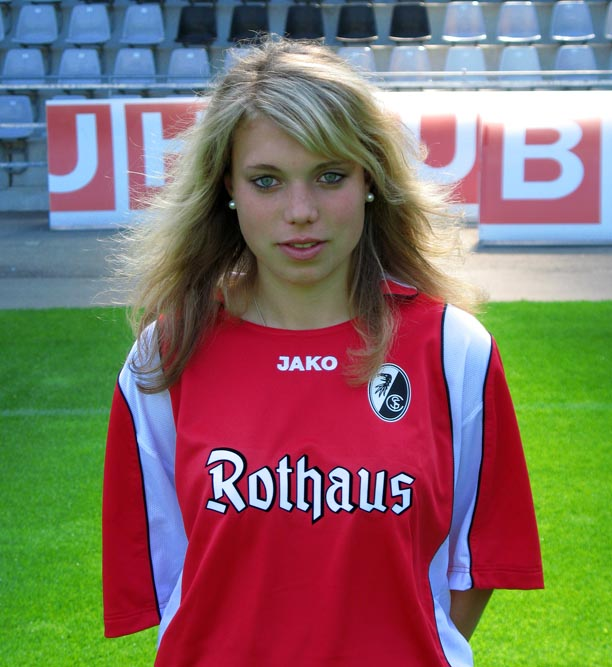 Nadine Enoch am 04.08.2007